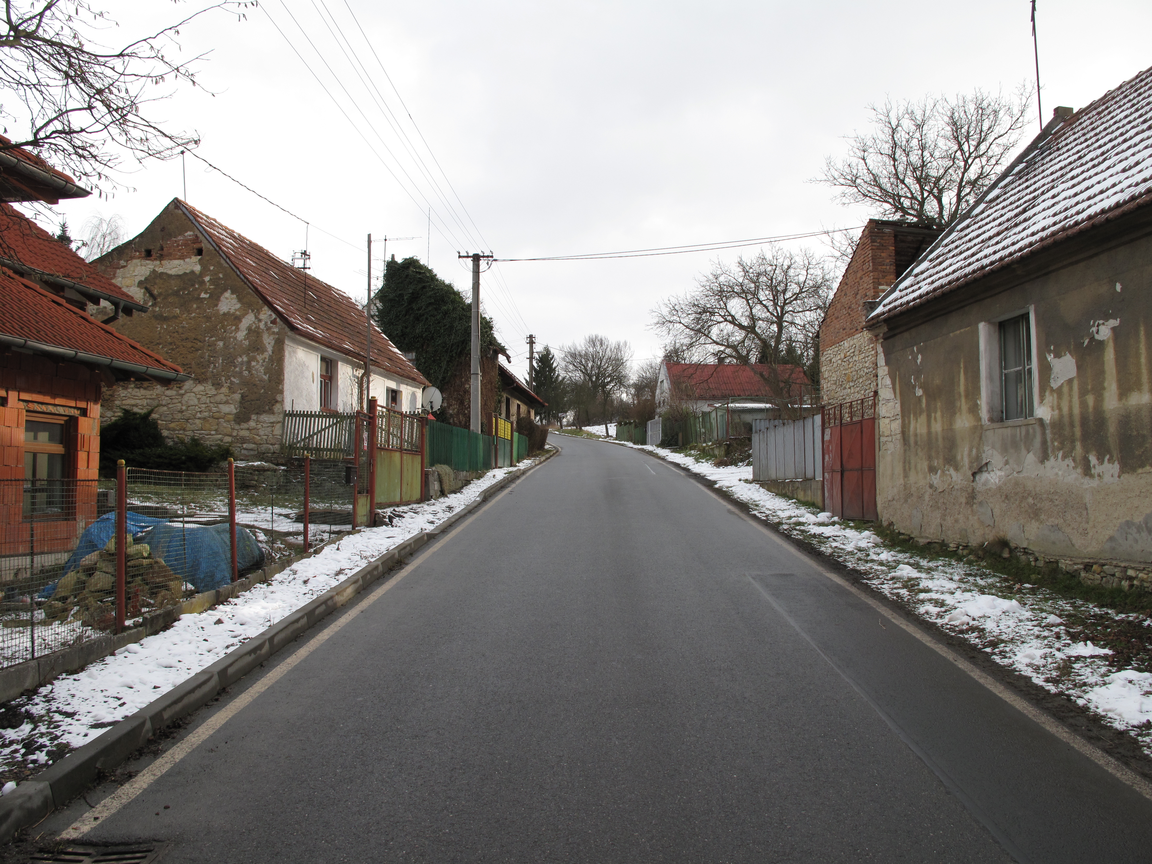 Ulice v Přerubenicích. Okres Rakovník, Česká republika.